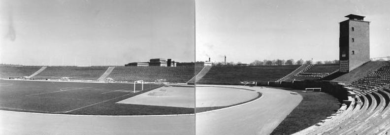 Rostock, Ostsee-Stadion Zentralbild Lehmann Na-Qu 3.5.1966 Vorbereitung XIX. Internationale Friedesnfahrt 1966 Prag-Warschau-Berlin vom 9.bis 25. Mai Etappenort Rostock Die 11. Etappe der diesjährigen Internationalen Friedensfahrt vo Szczecin nach Rostock (205 km) endet am 21. Mai im Rostocker Ostsee-Stadion (Foto)